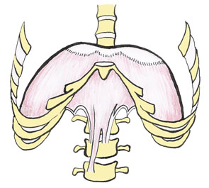 Yoga anatomie